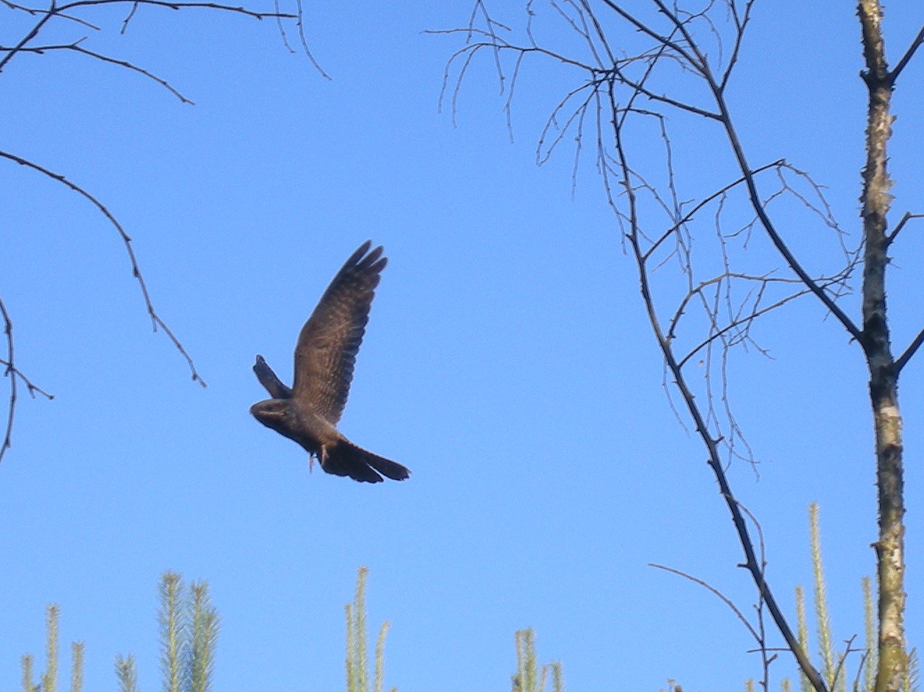 Lelek zwyczajny, lelek kozodój